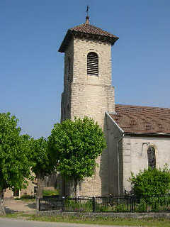 Montbouton, Territoire de Belfort. L'église date des années 1860 Photo prise en mai 2004 par LP90 Licence GFDL